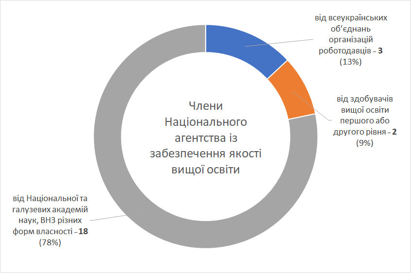 Квоти у Національному агентстві із забезпечення якості вищої освіти згідно з Законом України «Про вищу освіту» від 1 липня 2014 року (актуально з 28.09.2017)